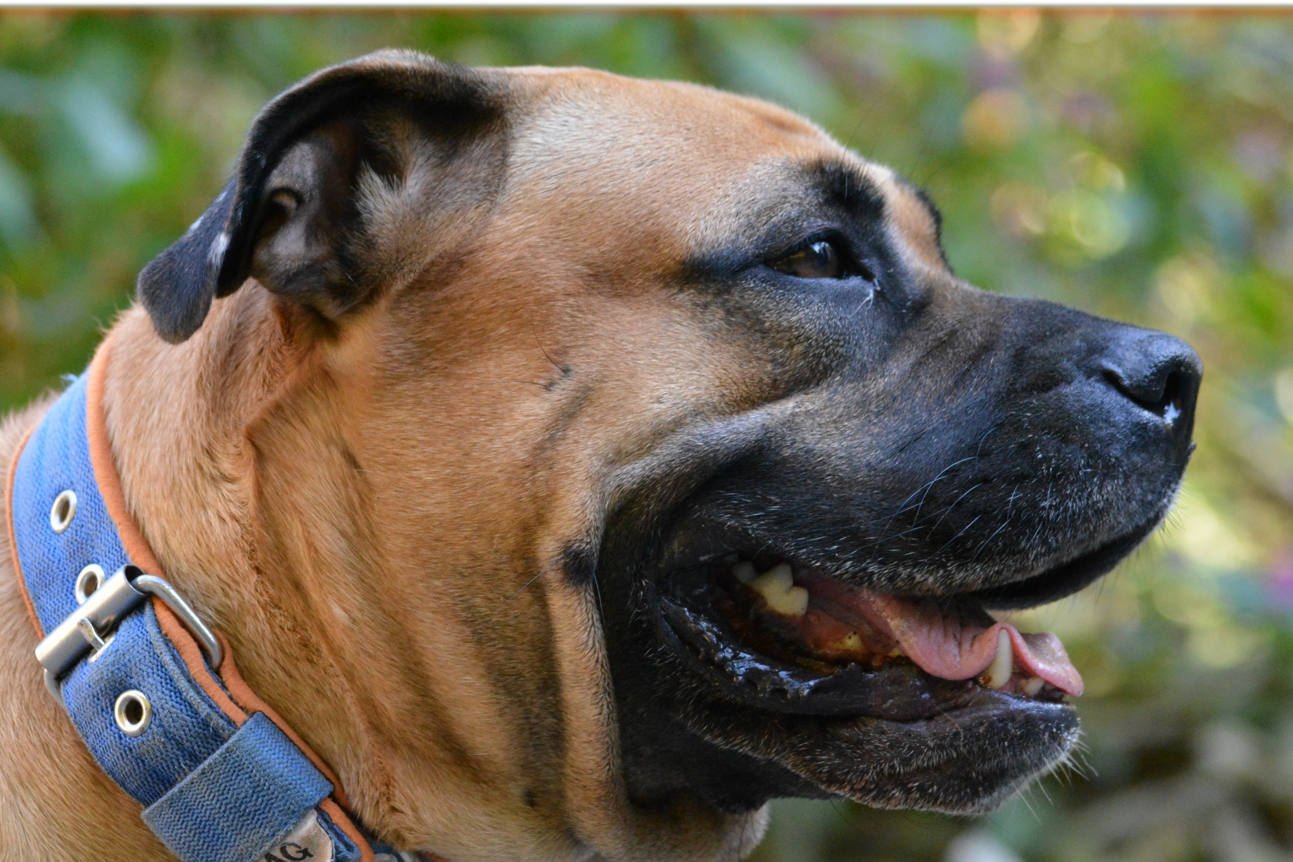 femelle dogue de majorque fauve à masque noir